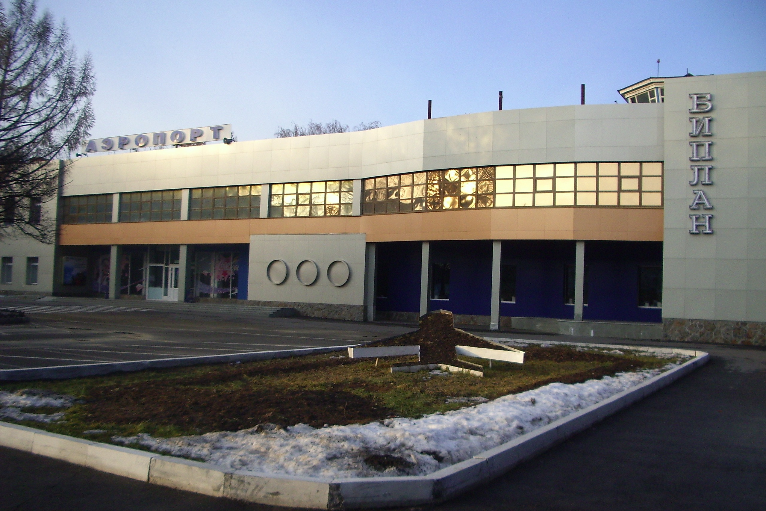 Терминал аэропорта в Чебоксарах